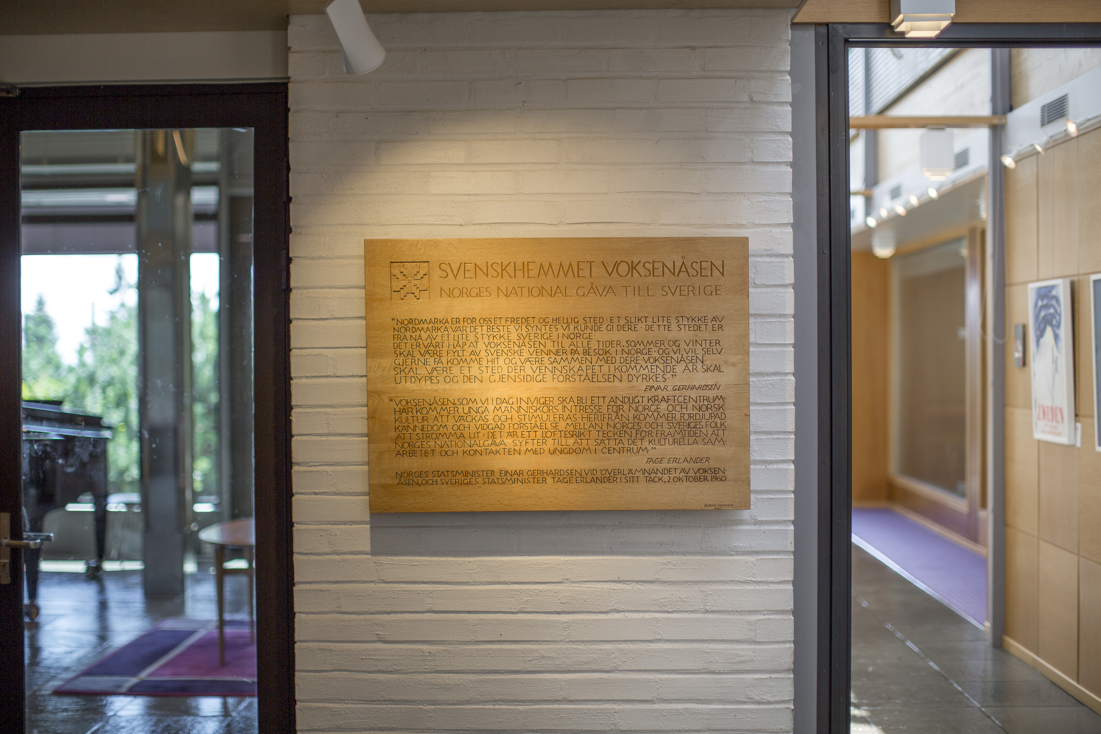 Utdrag fra taler holdt av Norges statsminister Einar Gerhardsen og Sveriges statsminister Tage Erlander ved overleveringen av Voksenåsen, 2. oktober 1960.